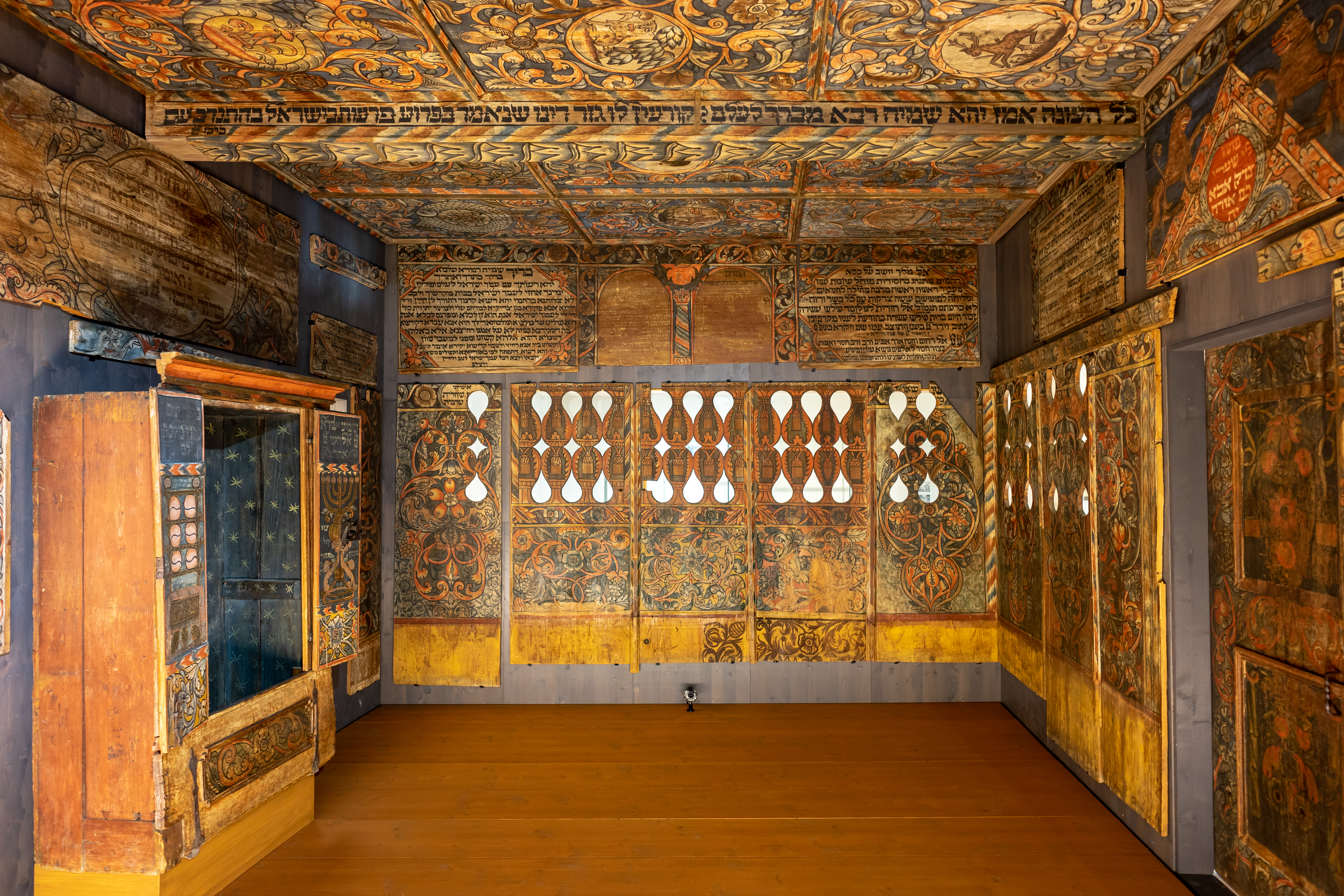 Hällisch-Fränkisches Museum in Schwäbisch Hall: Synagogenvertäfelung der ehemaligen Unterlimpurger Synagoge, ein Werk des Synagogenmalers Eliezer Sussmann aus dem 18. Jahrhundert. Links der ehem. Torah-Schrein. Sorry für die Bildqualität, aber ich musste die Aufnahmen aus der Hand ohne Stativ machen. Das geht nicht ohne Kompromisse.